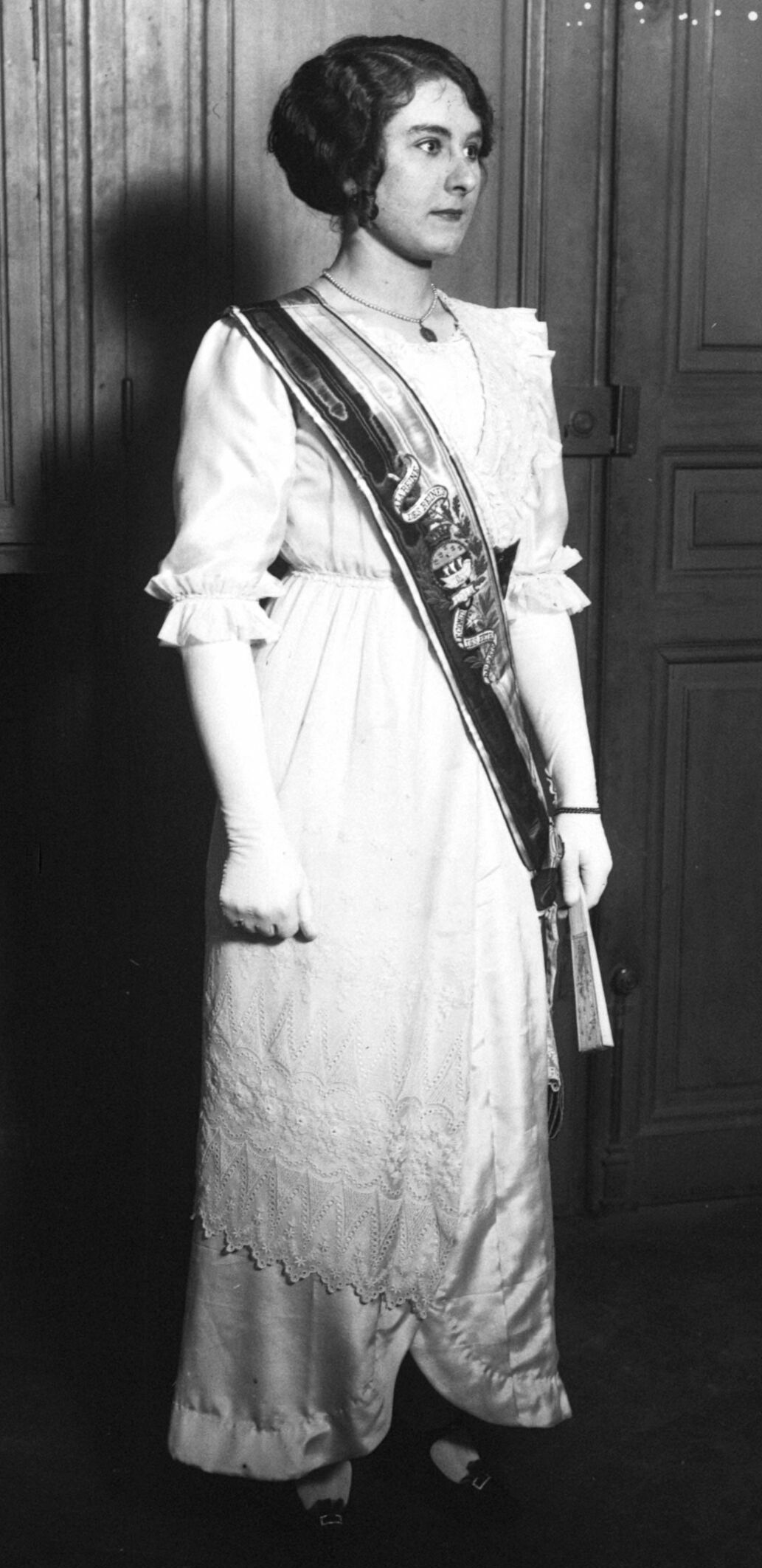 Marcelle Guillot, élue « Reine des Reines de Paris » au carnaval de Paris, le 21 février 1914